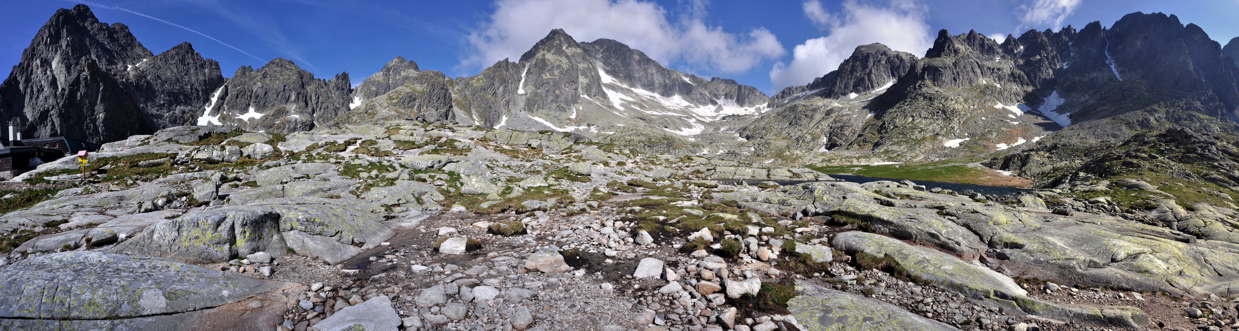 Otoczenie schroniska Terygo